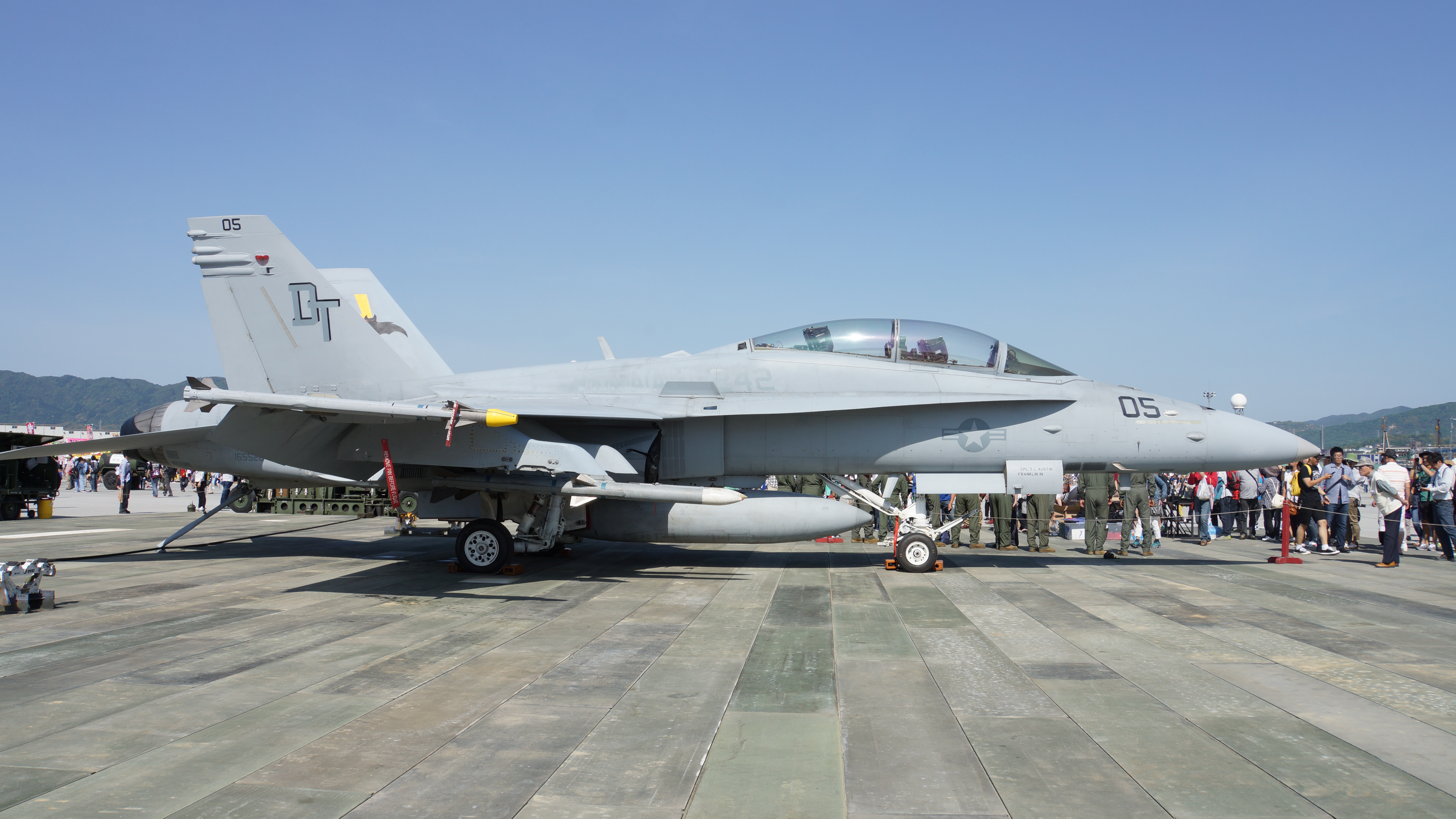 米海兵隊 地上展示されるF/A-18Dホーネット戦闘攻撃機 第242全天候戦闘攻撃中隊（VMFA-242）所属機（DT05、No.165528） 右側面。2016年5月5日 岩国航空基地にて。